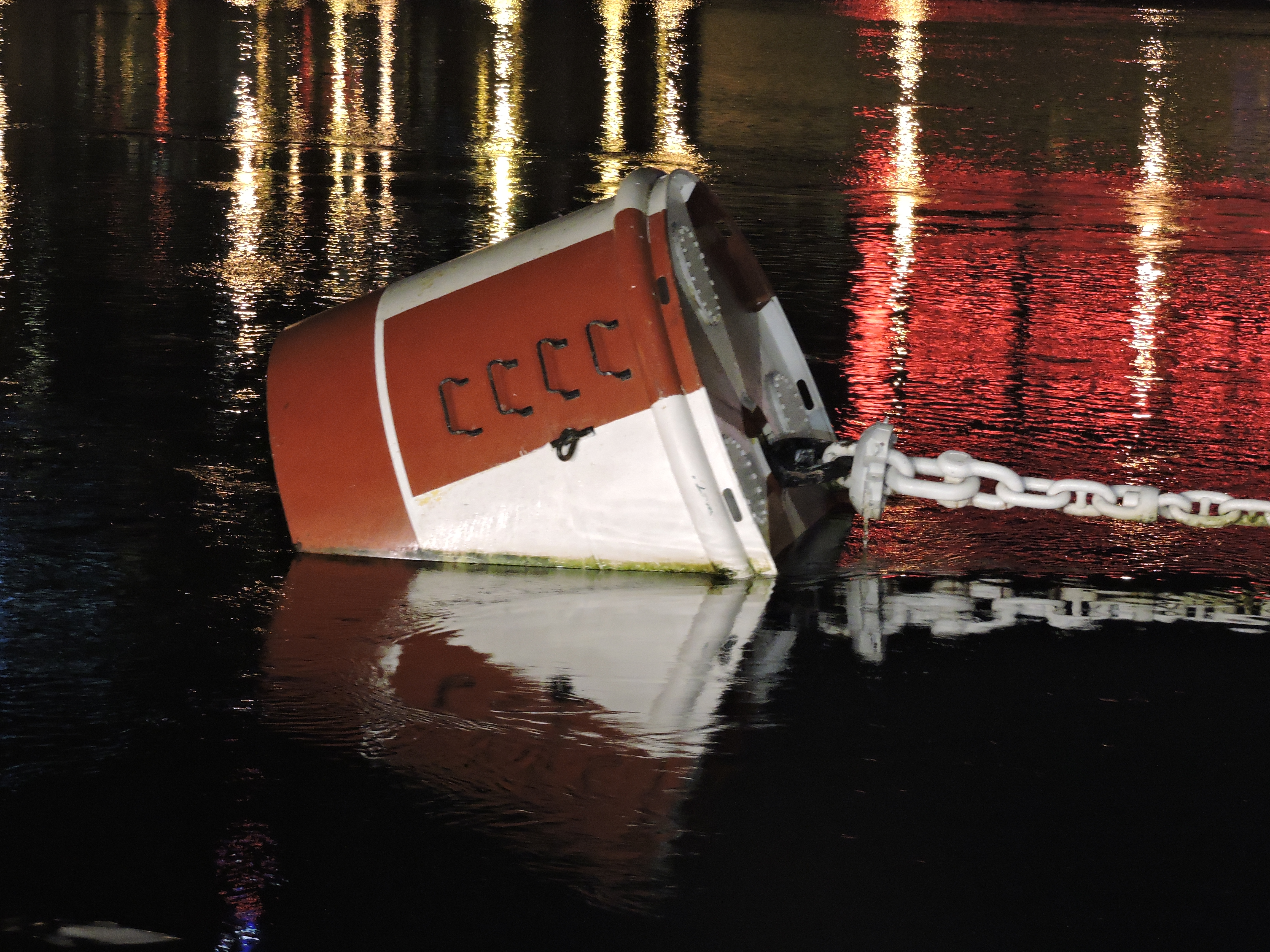 На таких 4 якорных бочках крепится крейсер "Аврора"